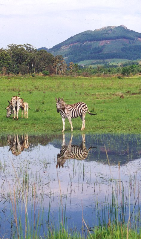 Zebras in Swaziland